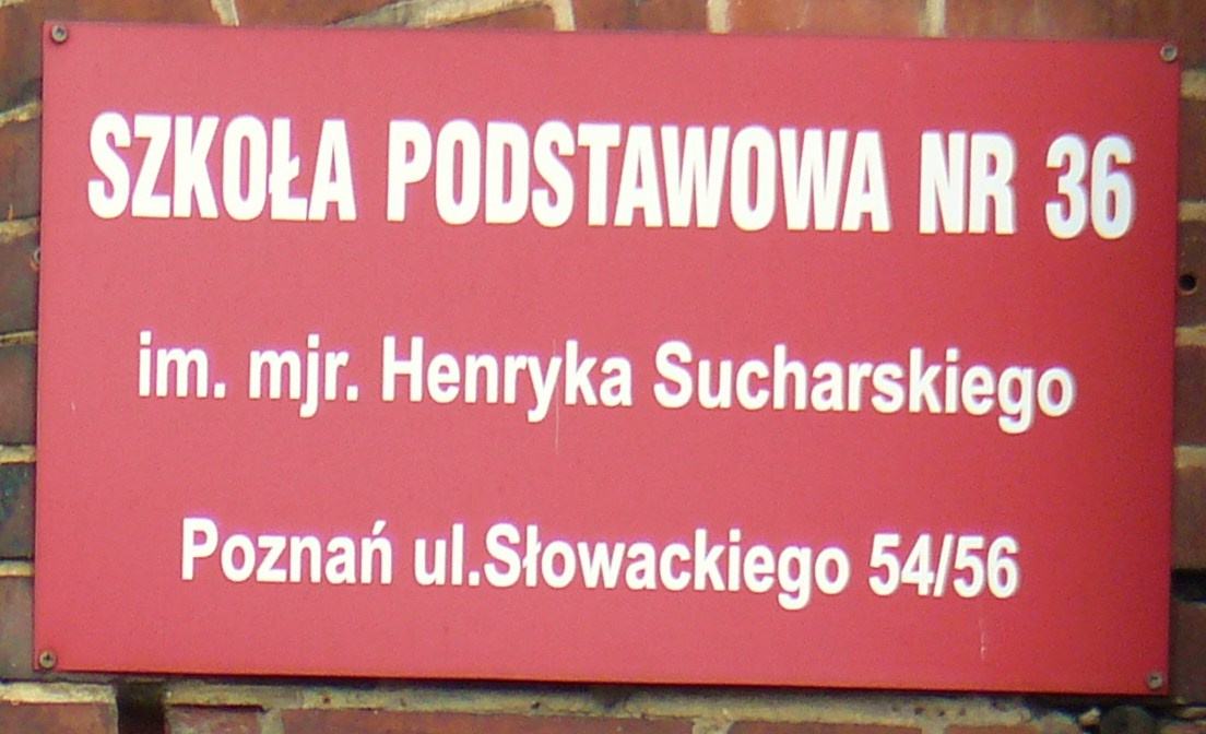 Szkoła przy ul. Słowackiego 54/60 w Poznaniu.